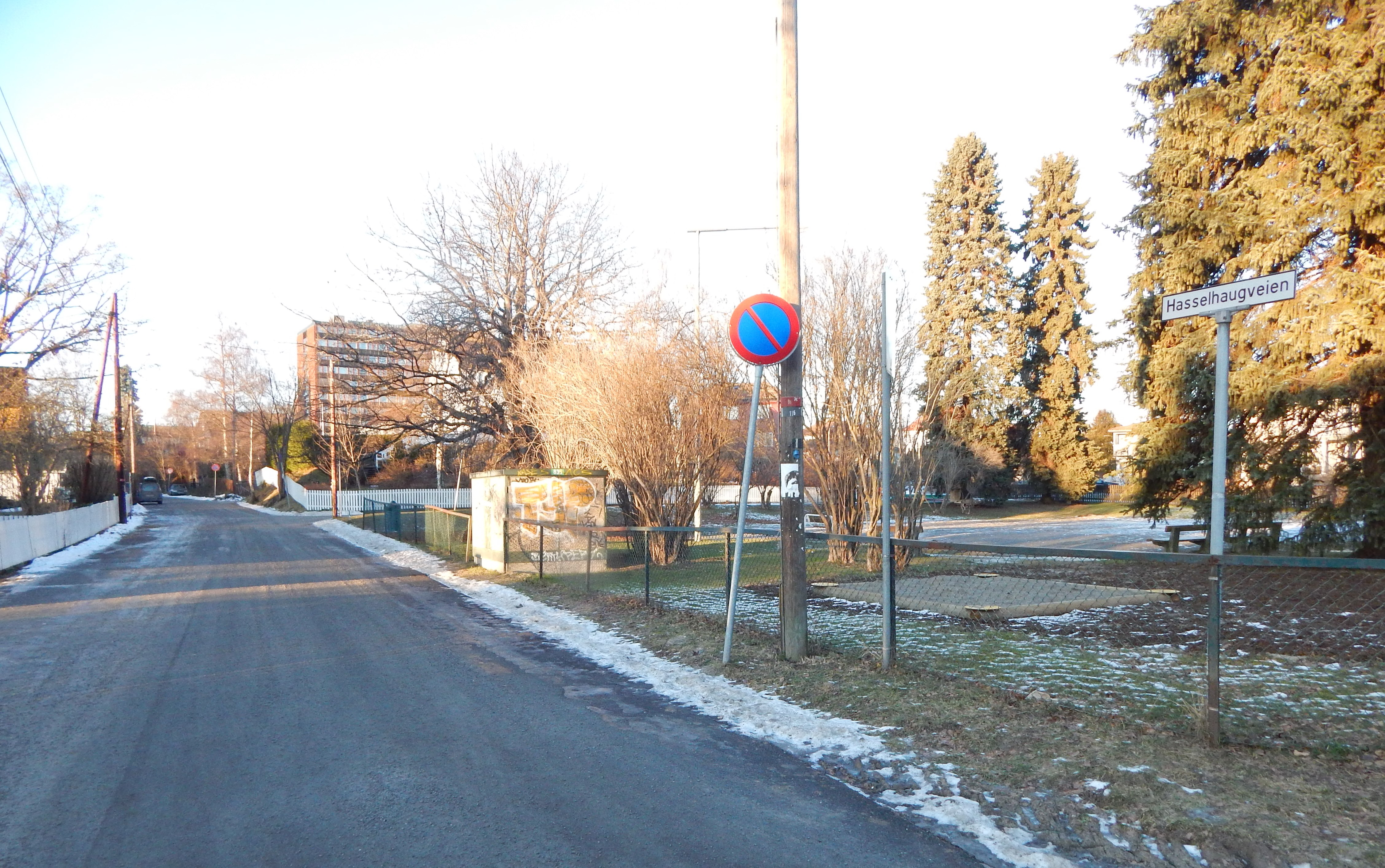 Hasselhaugveien i Oslo